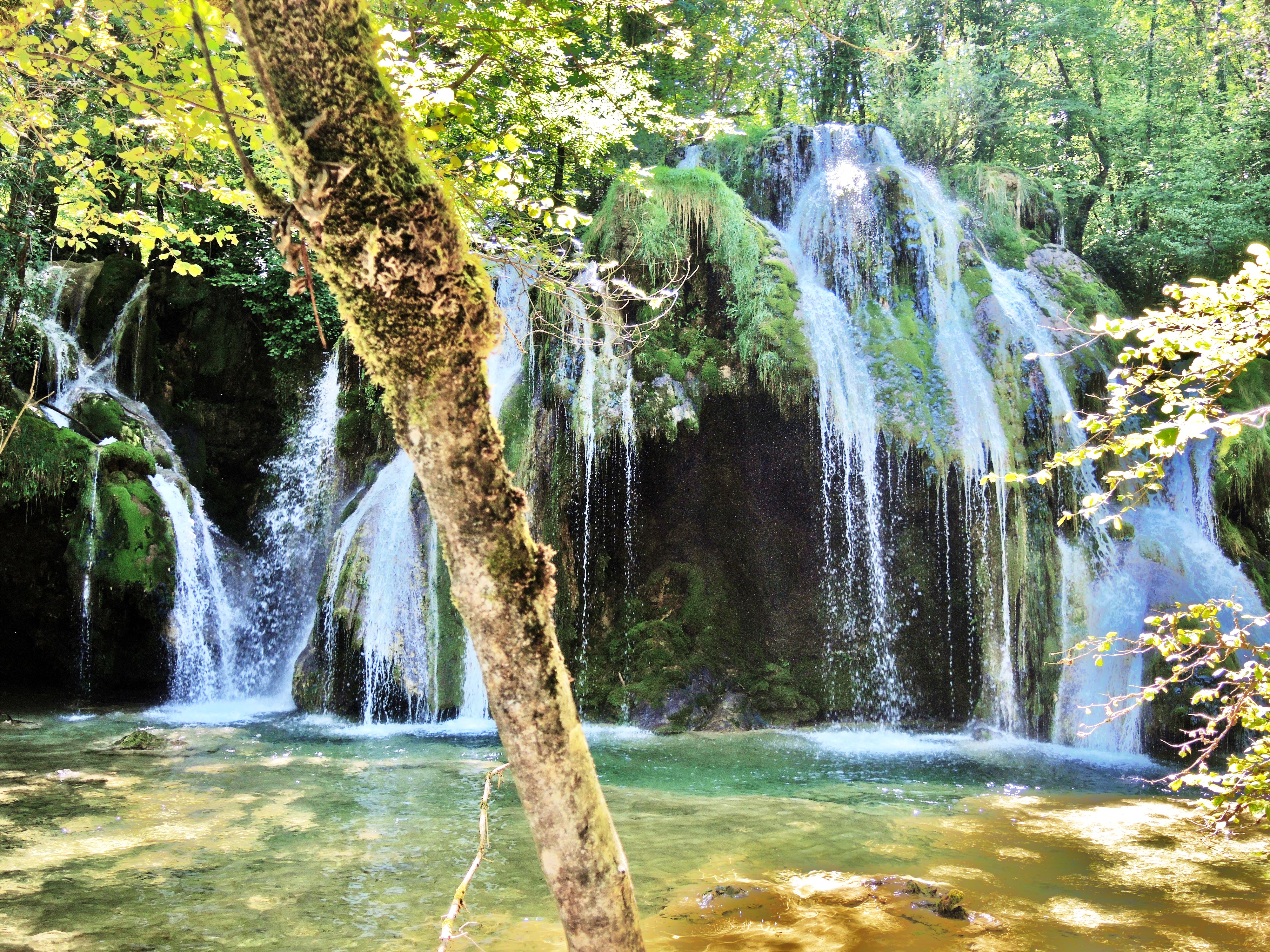 Cascade des tufs. Les Planches-près-Arbois. Jura.